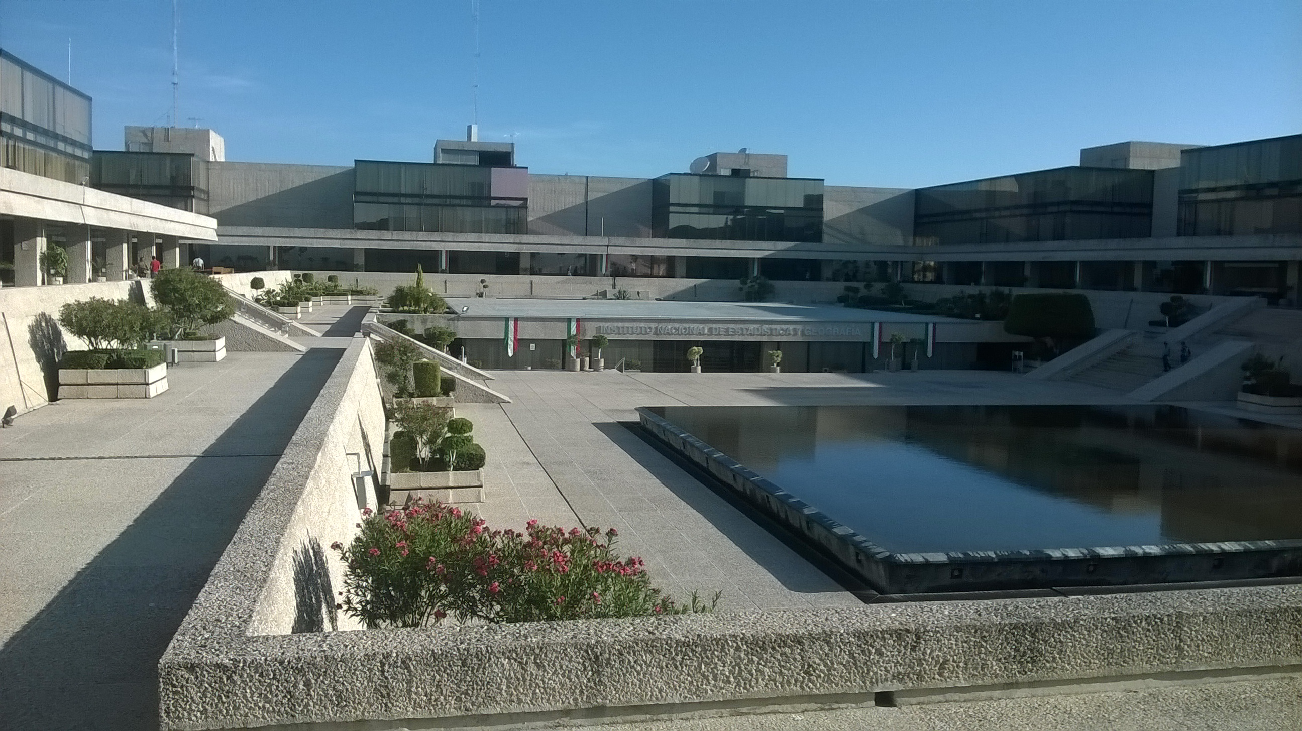 Fuente central de la sede del INEGI en Aguascalientes